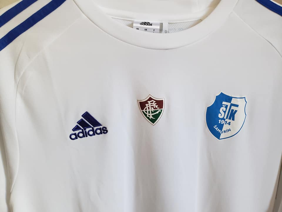 Camisa do FC ŠTK Fluminense 1914 Šamorín 2017-2019, parceria entre os clubes brasileiro e eslovaco que existiu com esse nome entre 2017 e 2019.